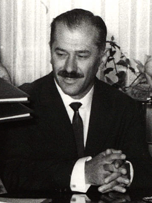 Srpski (latinica): Inventarski broj:1963_226_115